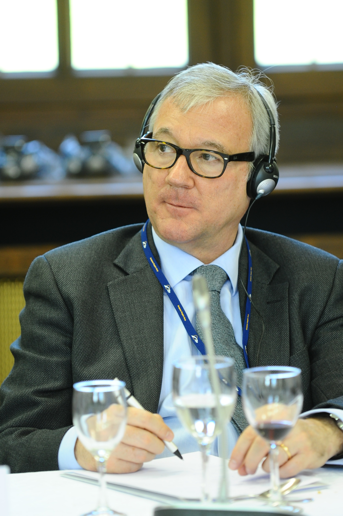 Ramón Luis Valcárcel Siso